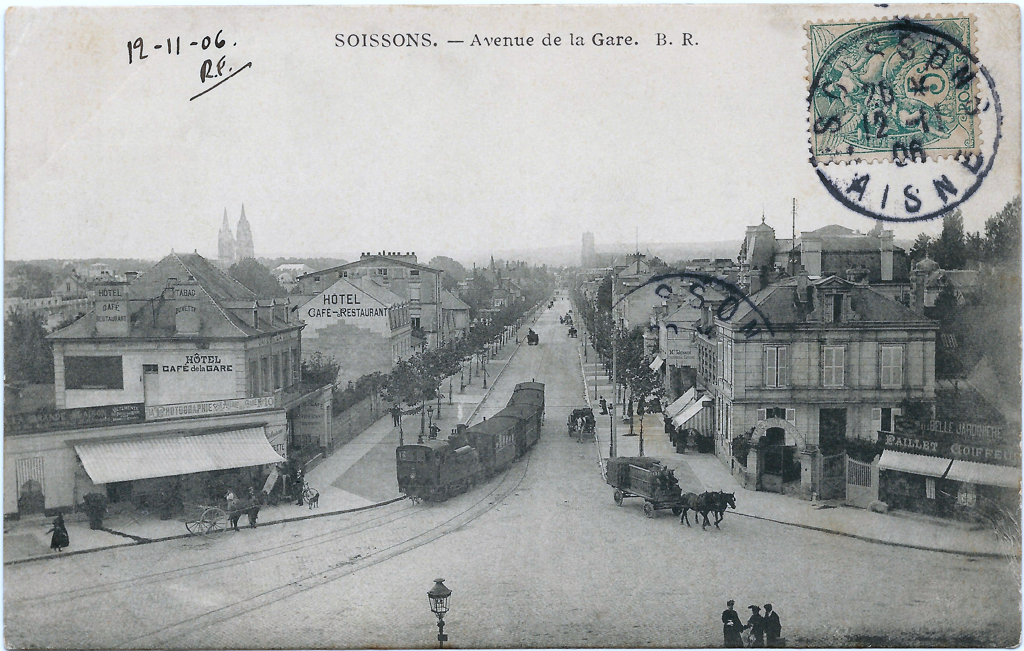 Binnenkomende lokale stoomtram in Soissons